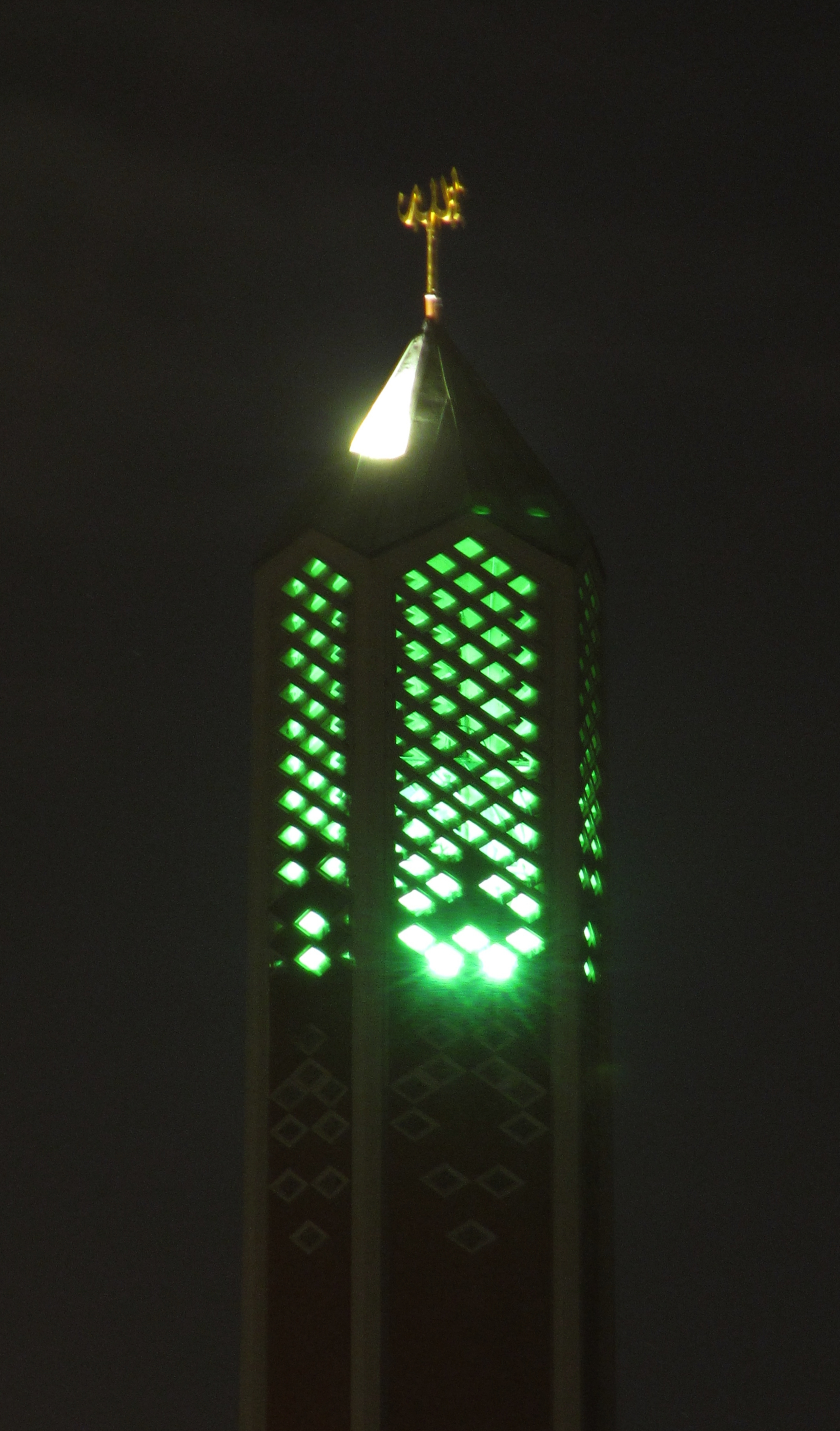 Turm der Moschee Hamburg-Horn mit Schriftzug "Allah" und grüner Innenbeleuchtung (ehemalige ev.-luth. Kapernaum-Kirchengemeinde) bei Nacht